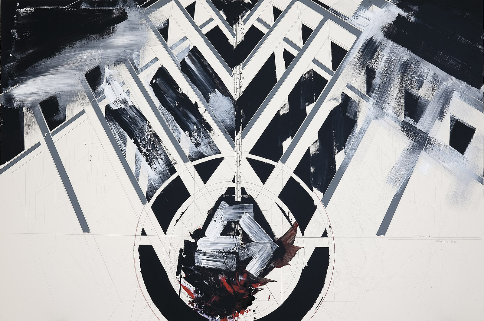 Jiří Sozanský, Skelet (kresba, tužka, akryl) 160 x 240 cm, 2012